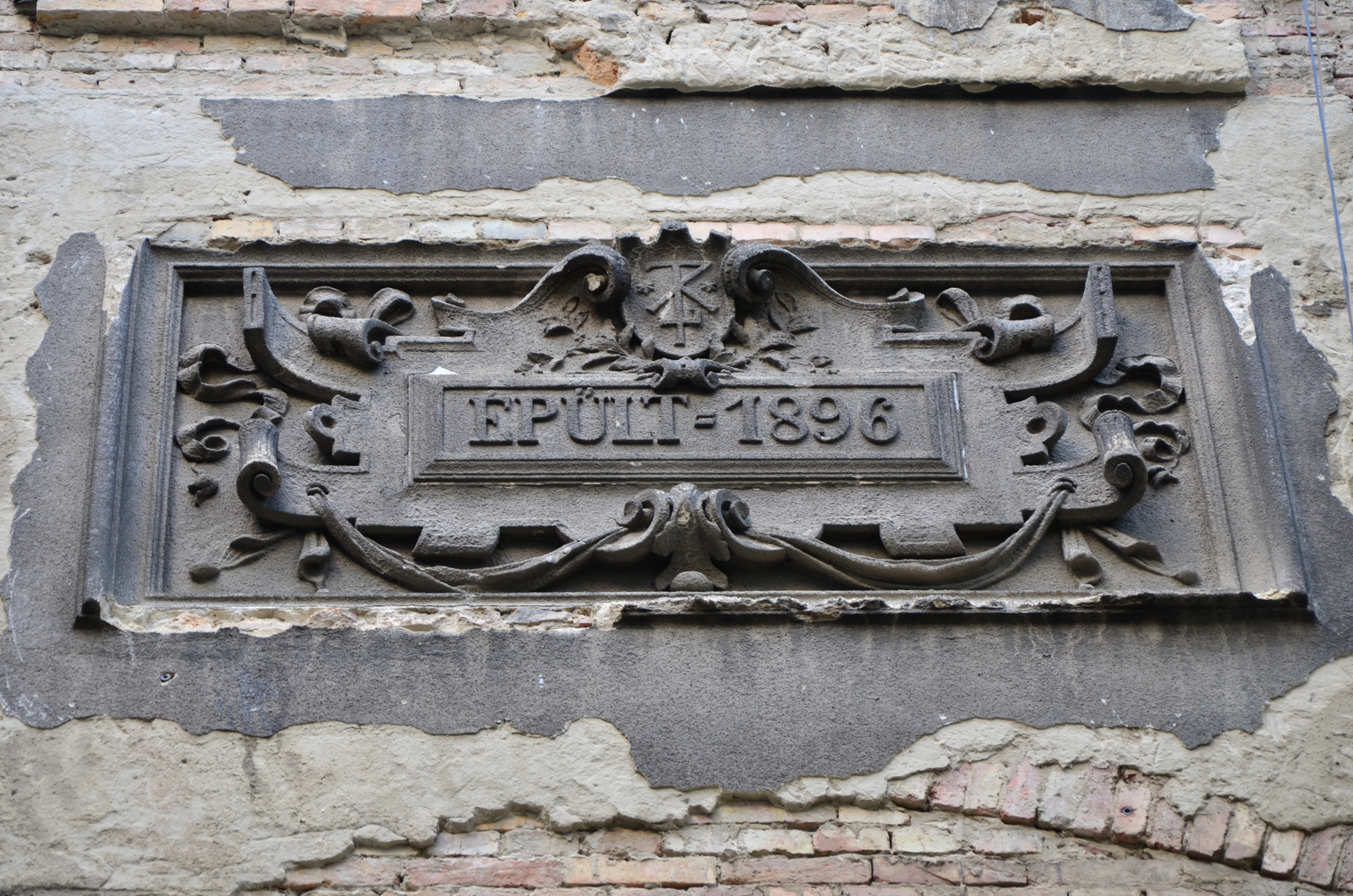 Lakóház (Budapest 8, Horánszky utca 16.) This is a photo of a monument in Hungary. Identifier: 12064